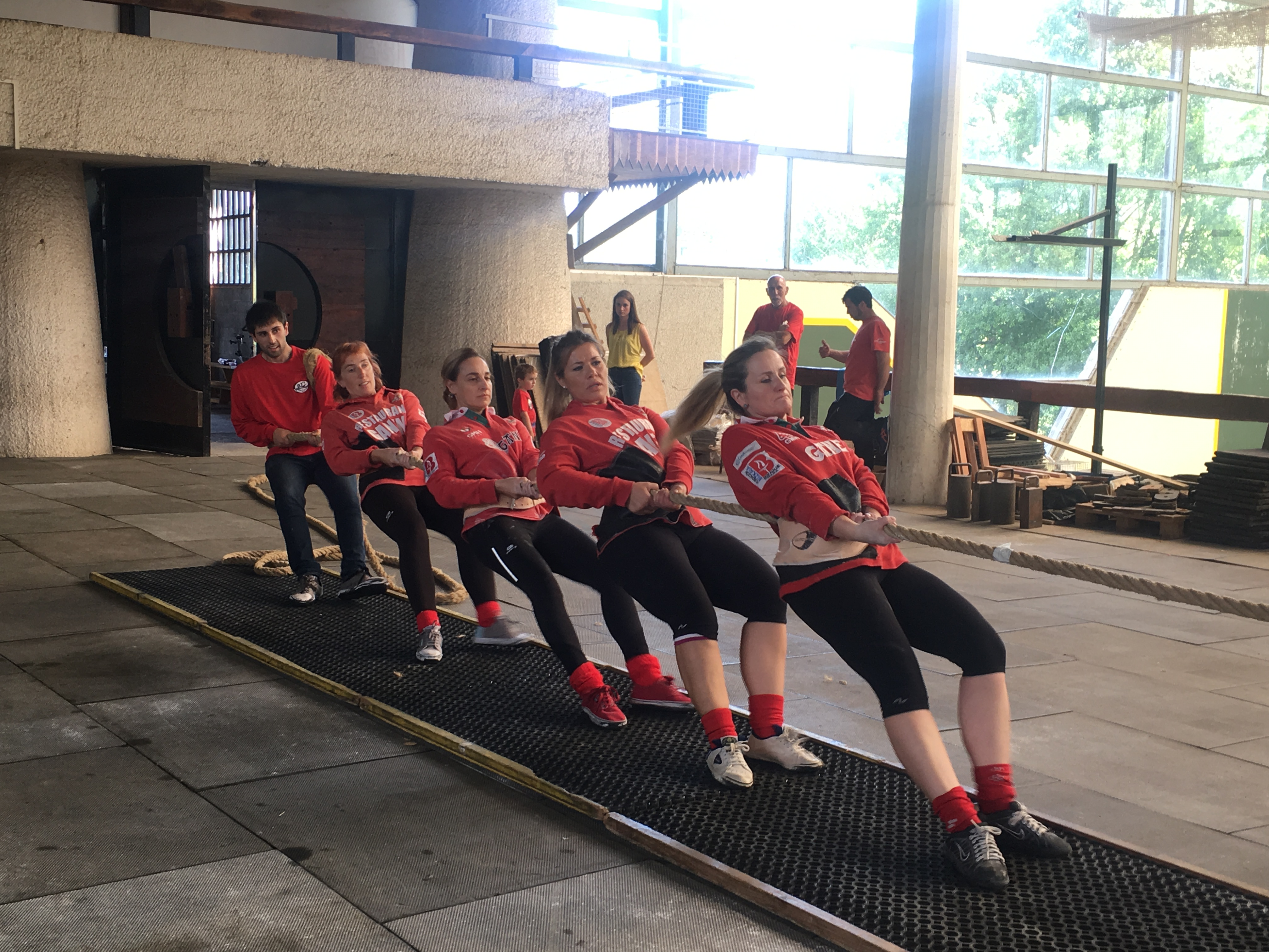 Gaztedi emakumezkoen sokatira taldea. 2019ko Kirol eguna